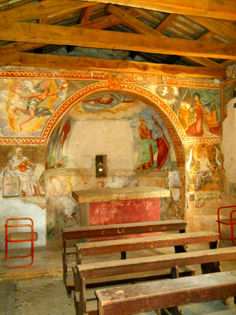 Mondellebotte